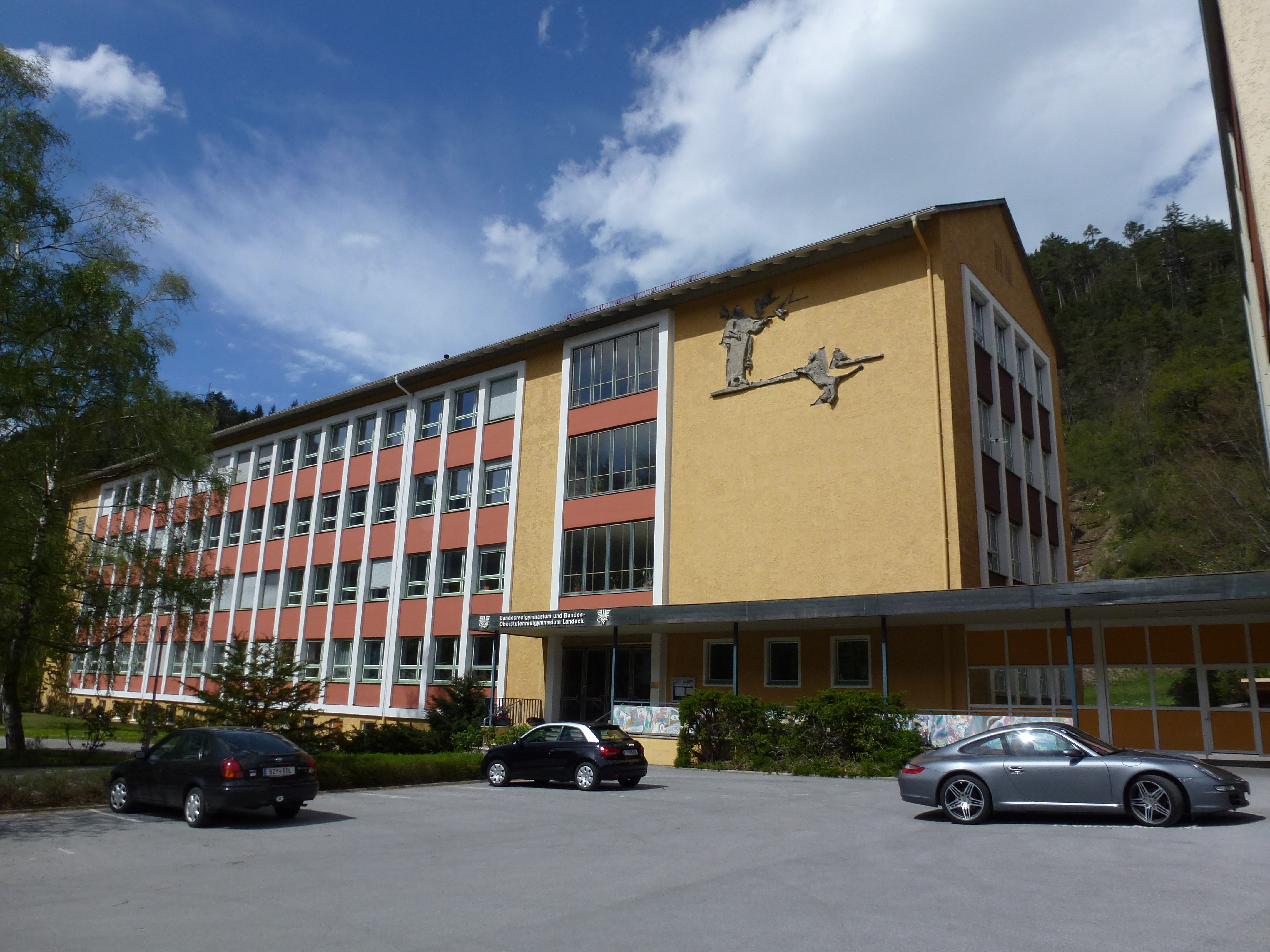 Bundesrealgymnasium Landeck-Perjen mit Kunst am Bau - Römerstraße 14, Landeck